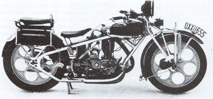 Advertentie uit 1927 van een niet meer bestaand bedrijf